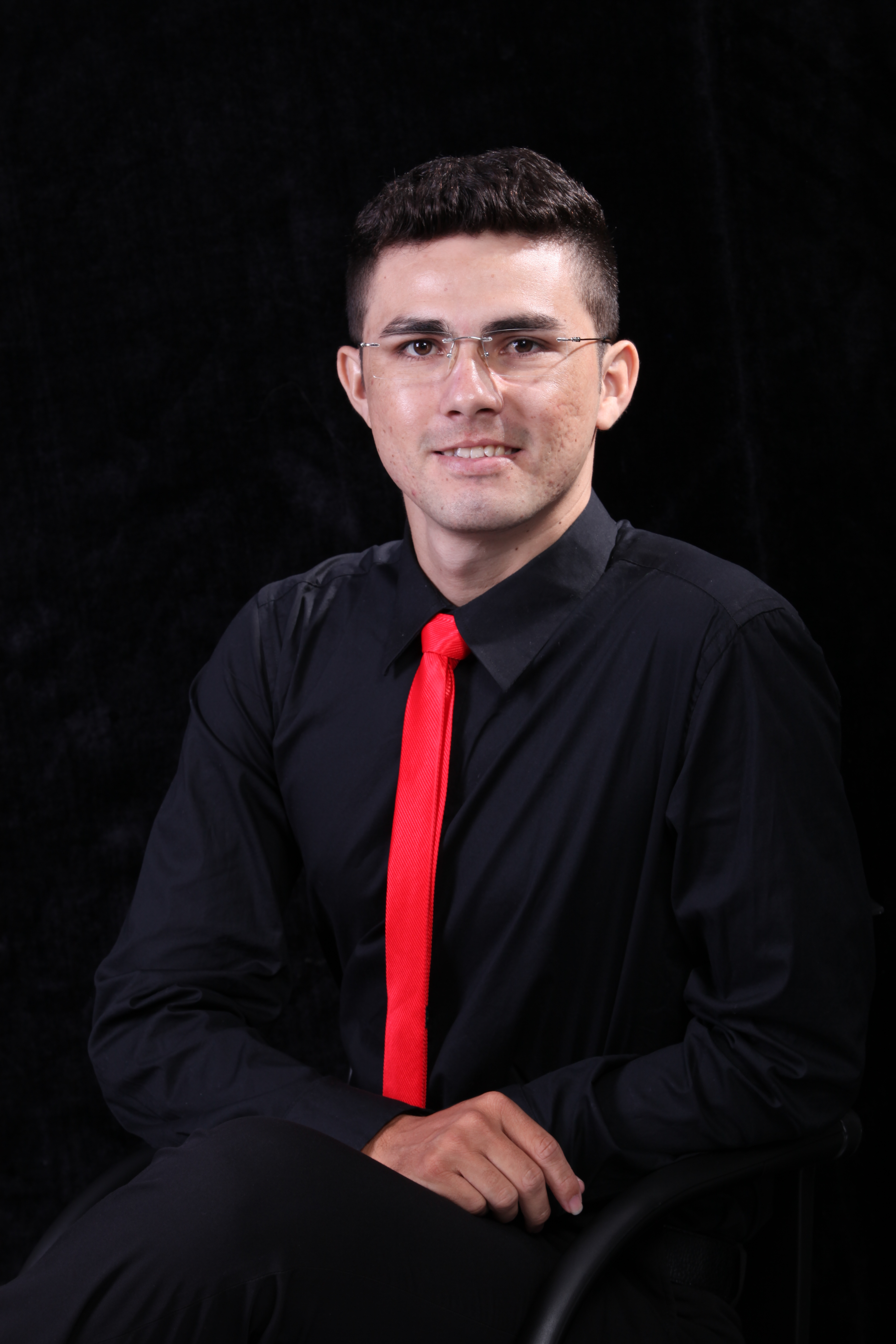 Foto oficial